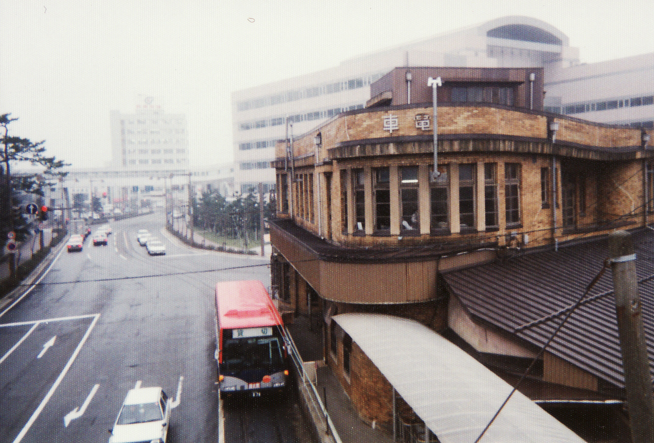 白山前駅舎と代行バス